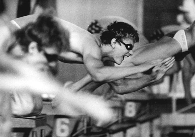 Jörg Woithe ADN-ZB Lehmann 28.5.82 Erfurt: DDR-Schwimmmeisterschaften - Olympiasieger Jörg Woithe com SC Dynamo Berlin verbesserte seinen eigenen Europarekord über 100 m Freistil um 14 Hundertsel auf 49,81s. Information added by Wikimedia users.Im Vordergrund der Drittplatzierte Peter Schneider